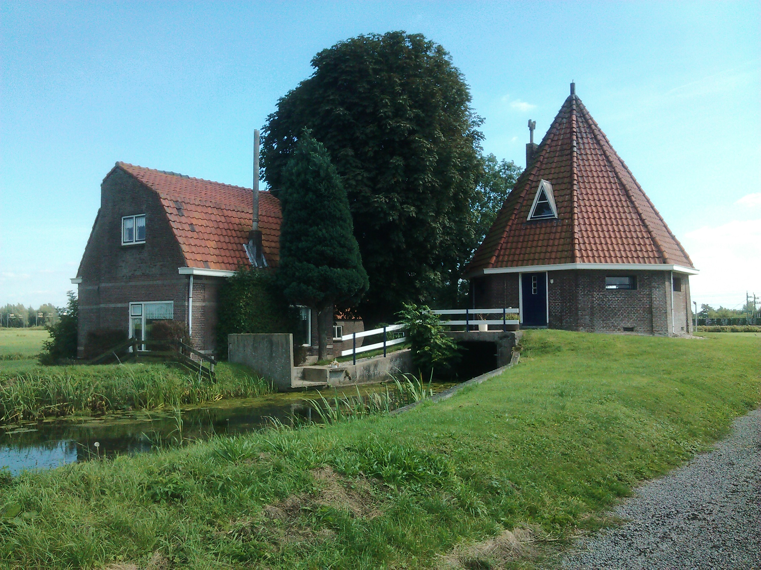 Breeveldse Molen (molenromp) 2 (Android).